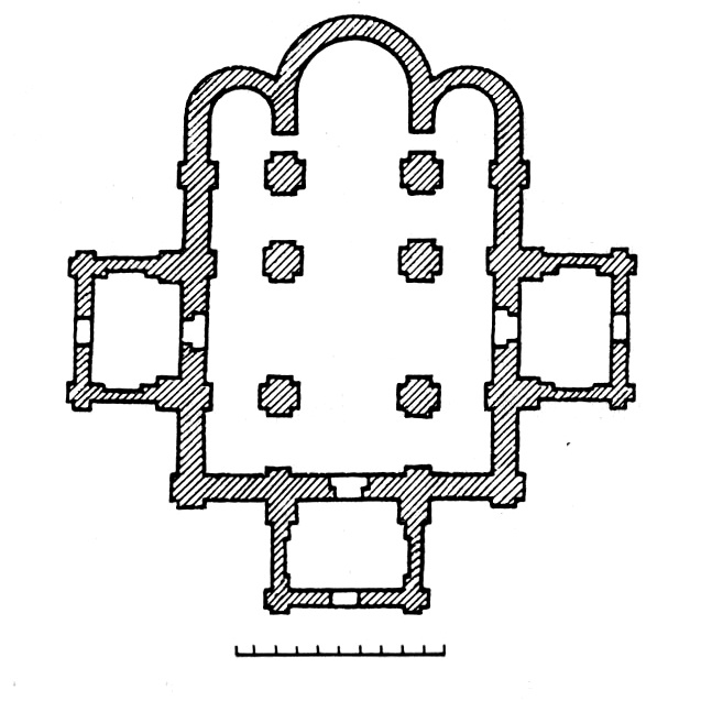 Вялікі сабор у Бельчыцах